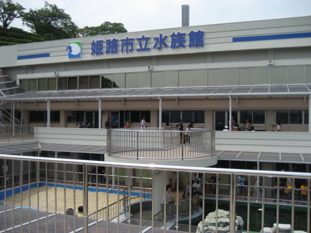 姫路市立水族館・本館。